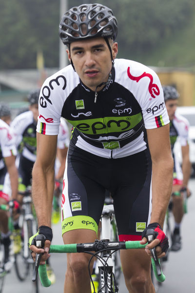 Juan Pablo Suarez con el equipo EPM UNE en 2014